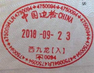 中文（中国大陆）: 西九龙口岸入境章